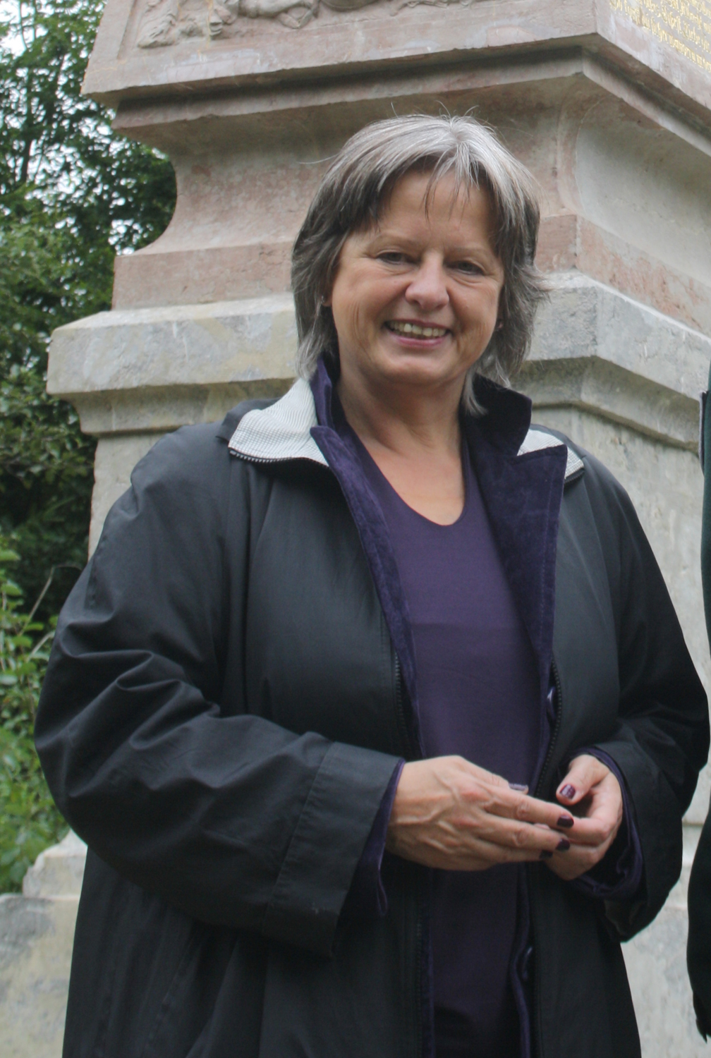 Gabriele Friderich, derzeit (Juli 2011) noch Kommunalreferentin in München. Hier am 18. August 2010 bei einem Pressetermin (vor der Preysingsäule) im Münchner Forst Kasten (